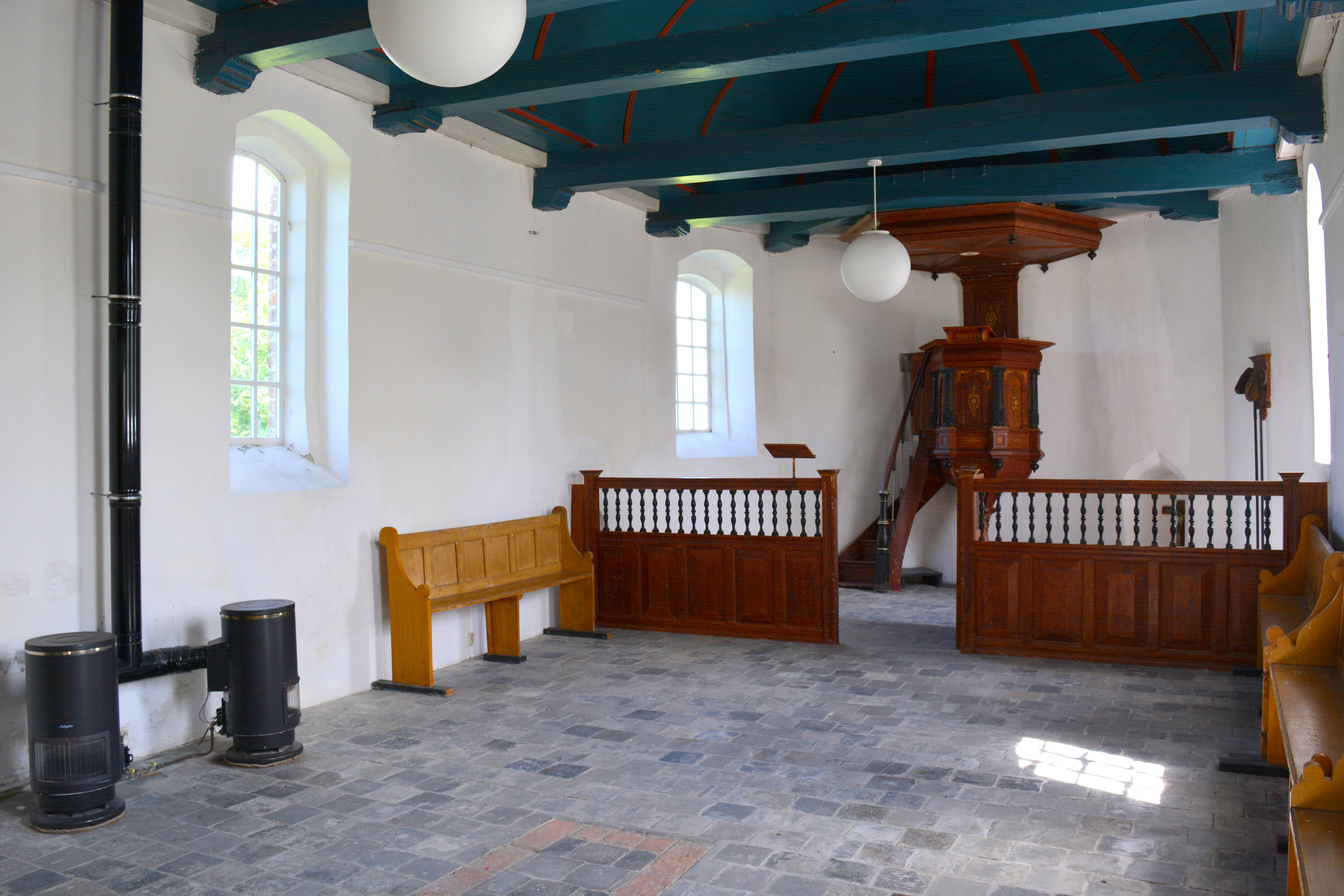 Lichtaard, Petruskerk, interieur